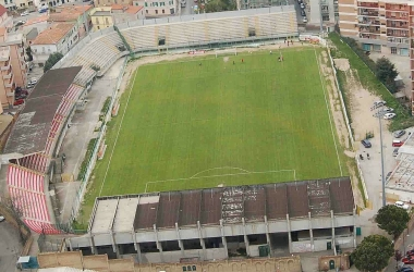 Stadio Aragona di Vasto(CH) utilizzato per eventi calcistici